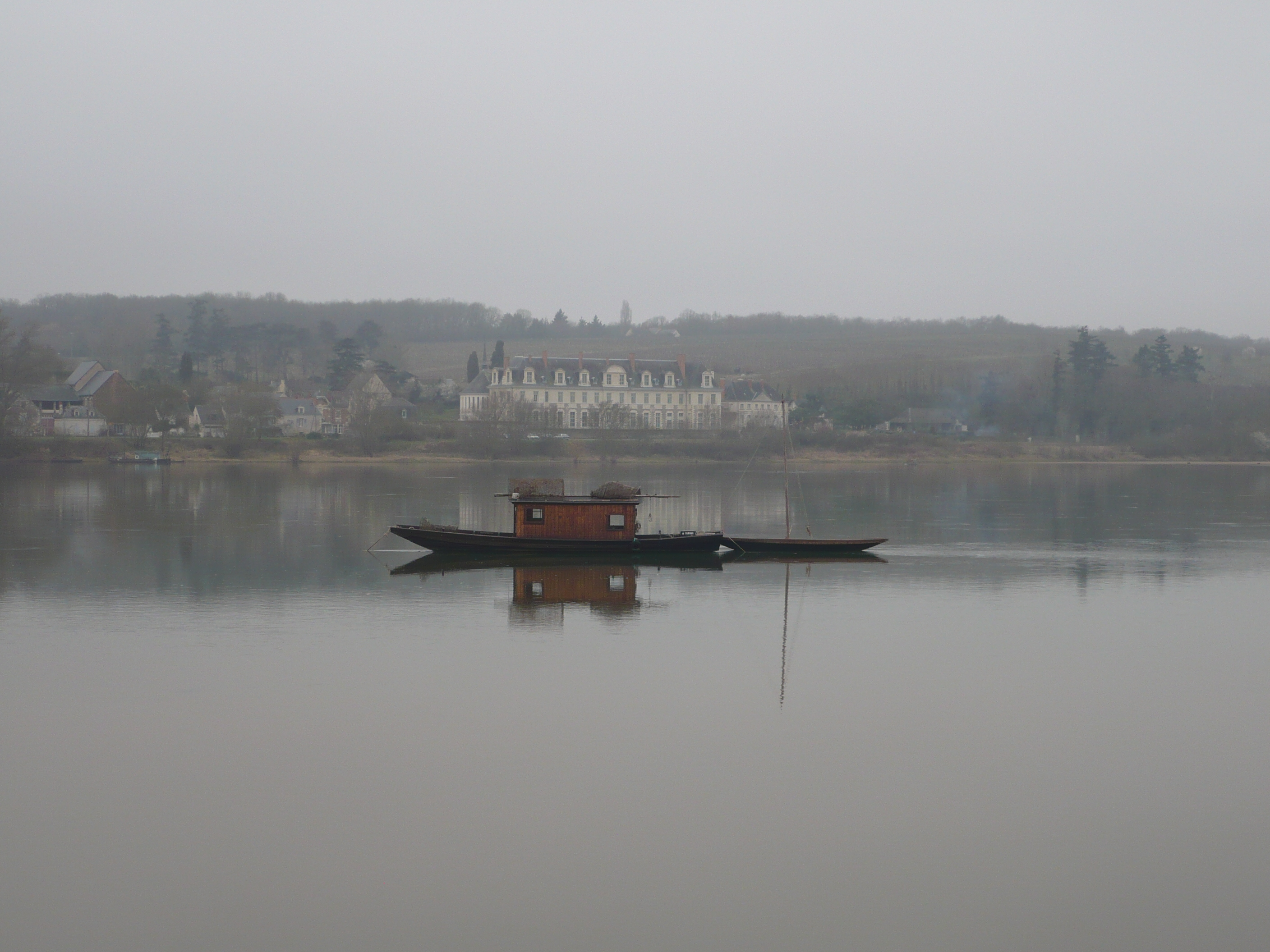 Abbaye Saint-Maur de Glanfeuil vue depuis le port de Saint-Maur à la Ménitré (Maine-et-Loire, France).